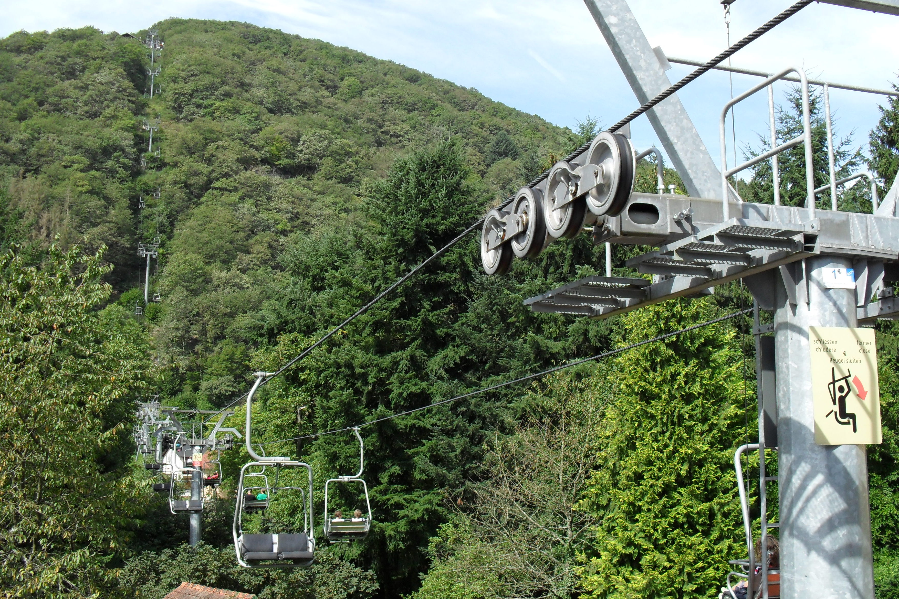 Télésiège de Vianden: vue générale sur le parcours